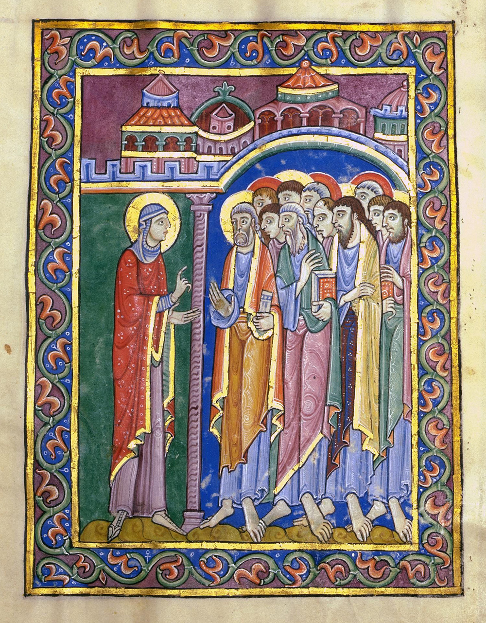 Maria Magdalena berichtet den Jüngern. In: Albani-Psalter